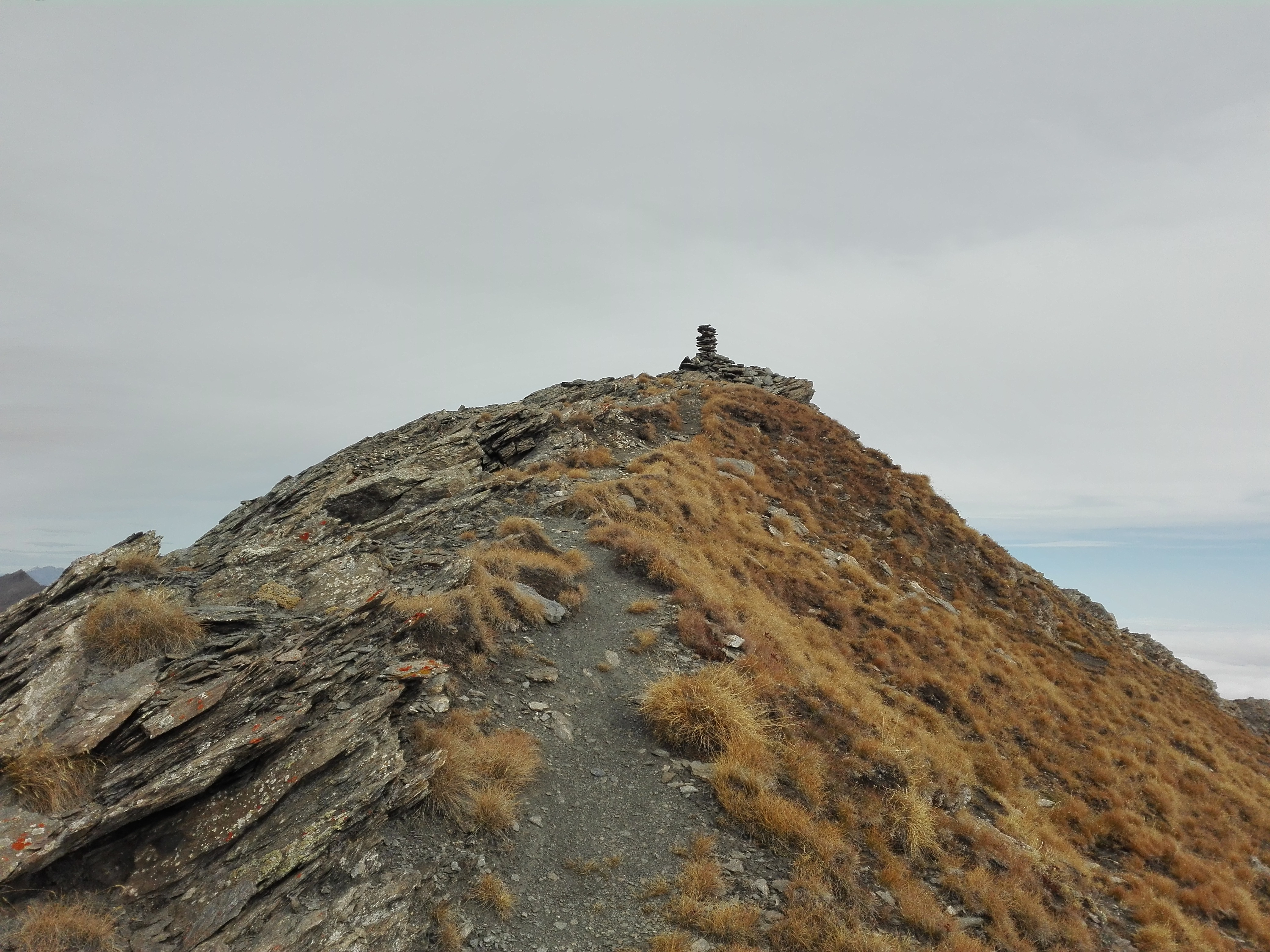 La vetta della montagna dal versante che scende al colle Frappier